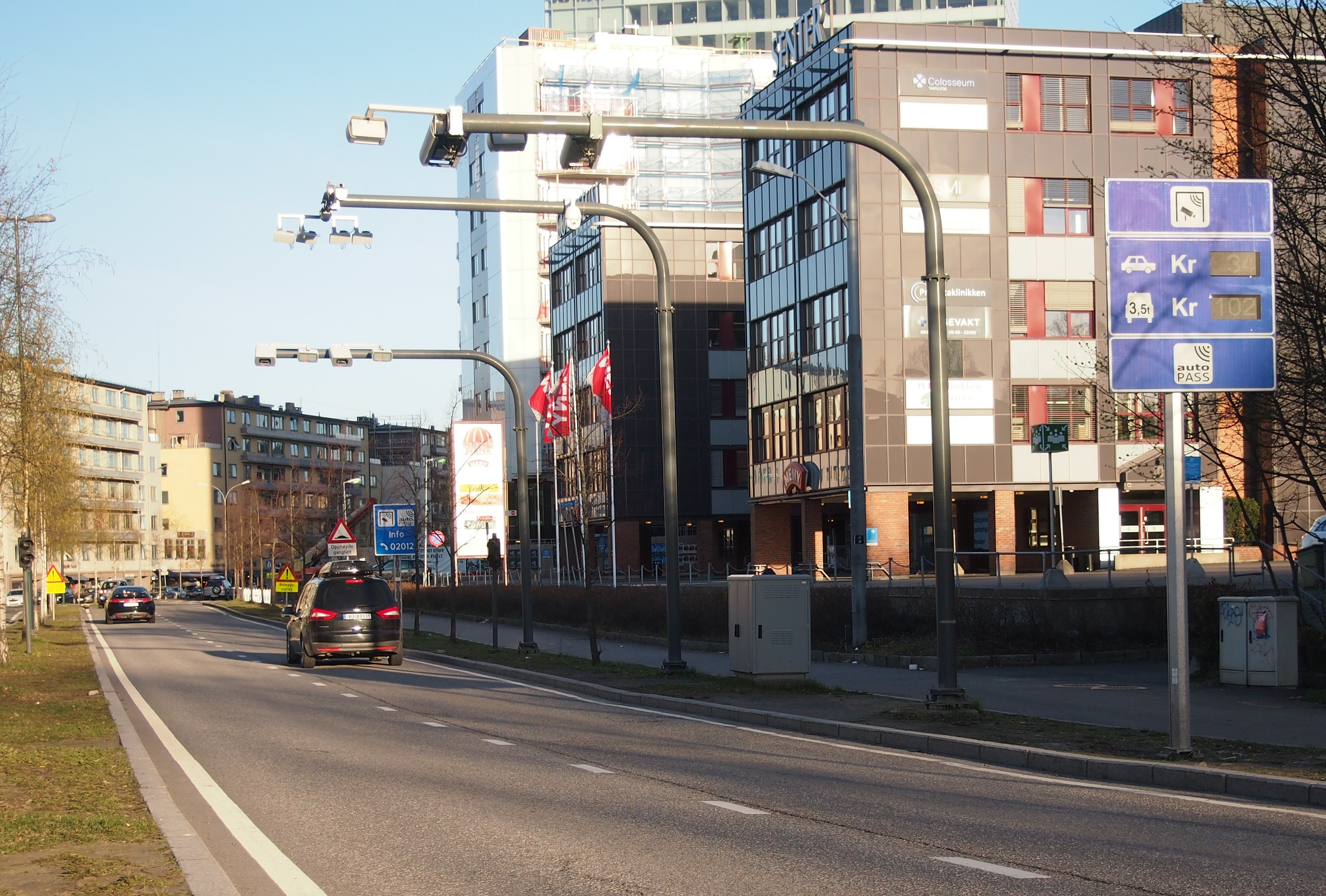 Bompengestasjon ved innskjørsel til bomring i Oslo.